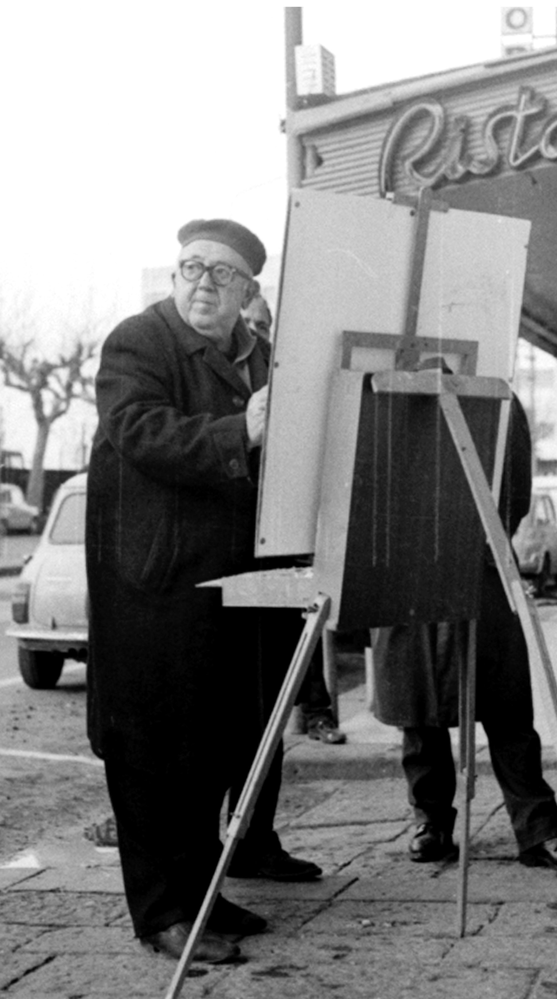 Il pittore Vincenzo D'Angelo